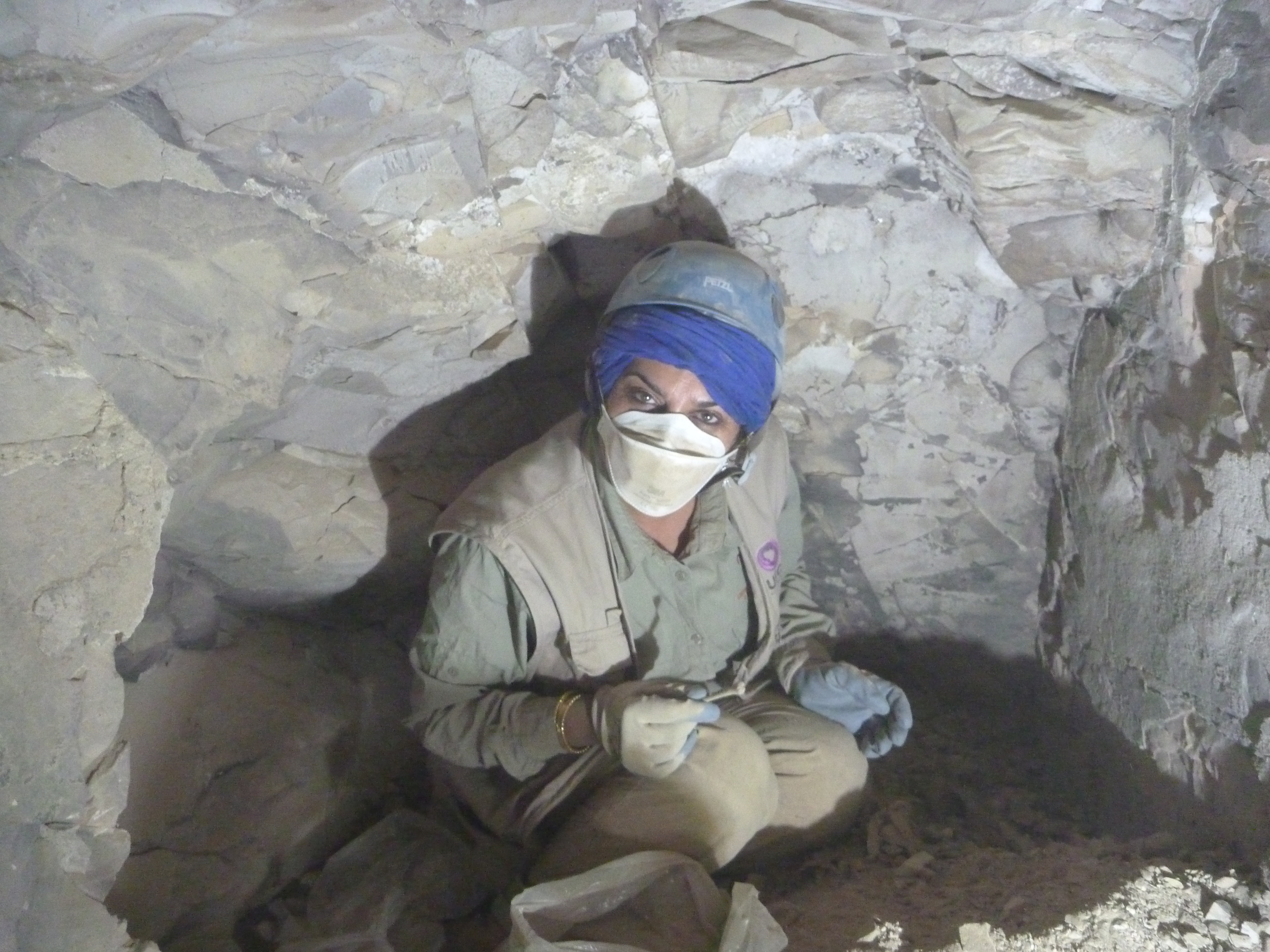 Salima Ikram en fouilles